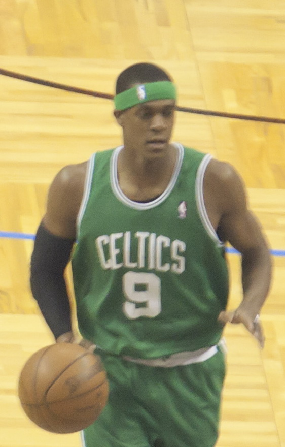 BOS-ORL056